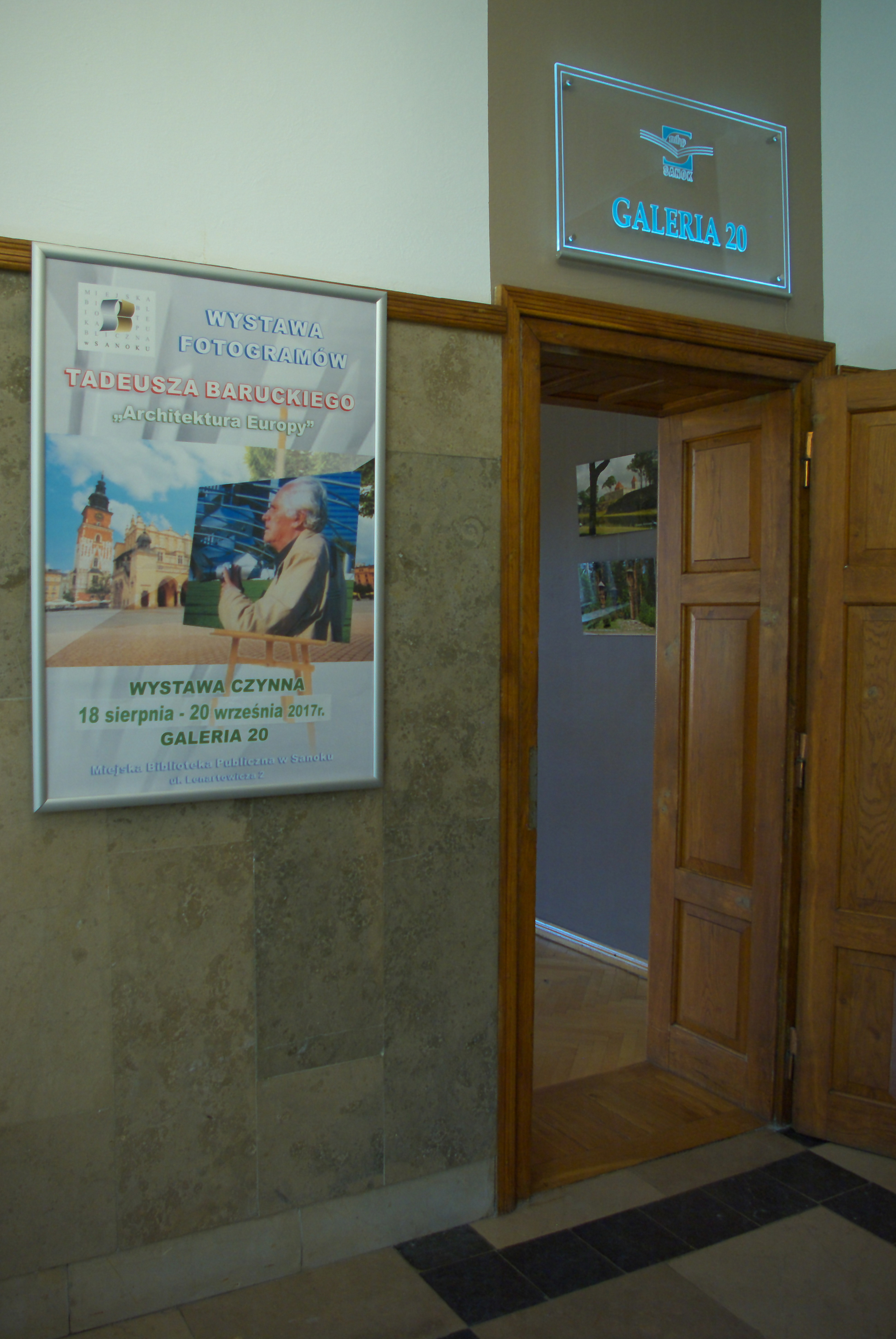 Wystawa fotografii Tadeusza Baruckiego zorganizowana w Miejskiej Bibliotece Publicznej im. Grzegorza z Sanoka w Sanoku w dniach do 18 sierpnia do 20 września 2017.